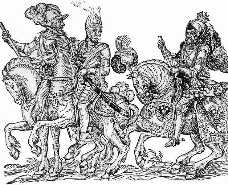 Schwendi Lázár, Thury György és II. Miksa (imeretlen német mester korabeli fametszete)